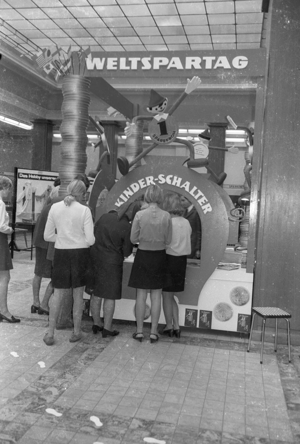 Kinderschalter der Kieler Spar- und Leihkasse (vermutlich).